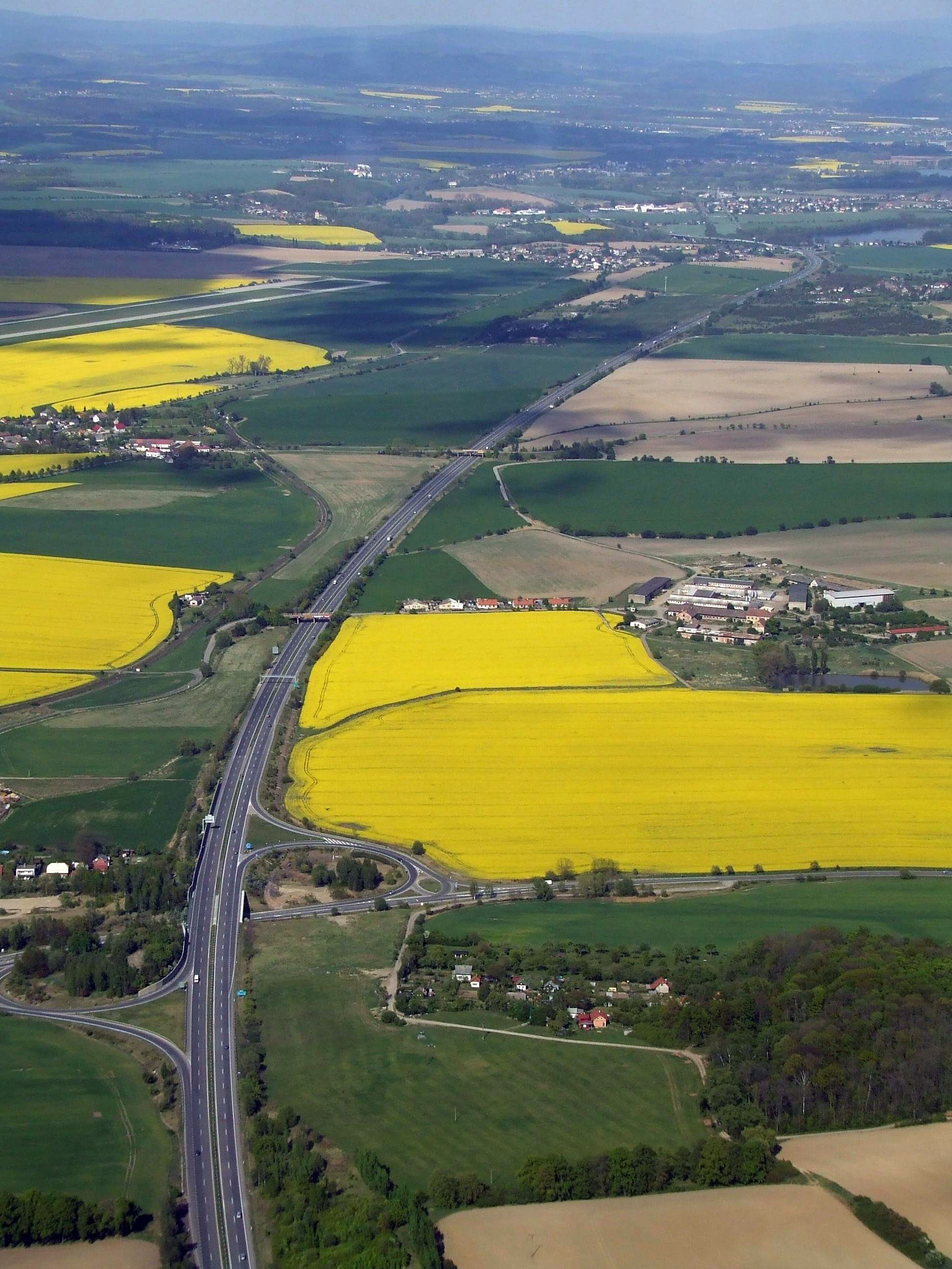 Rychlostní silnice R10 - Exit Mnichovo Hradiště (vlevo), pohled směrem na Turnov